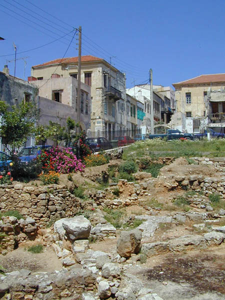 La Canée est construite sur l'emplacement de la ville antique de Kydonia. Pendant la période néopalatiale, Kydonia est un centre important. Il en est de même durant les périodes romaines et byzantines. Les vénitiens y construisent une forteresse sur la colline qui domine le port, ainsi qu'une cathédrale, un palais, un théâtre et de nombreuses maisons pour les nobles. Des remparts sont élevés en 1537 pour se protéger d'une invasion turque mais la ville est prise par eux en 1645. Aujourd'hui, La Canée est la 2ème ville de Crète, c'est celle qui a le mieux conservé les traces de son passé. (Les photos numériques ont été prises en 2001)